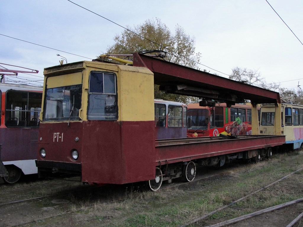 ТК-28